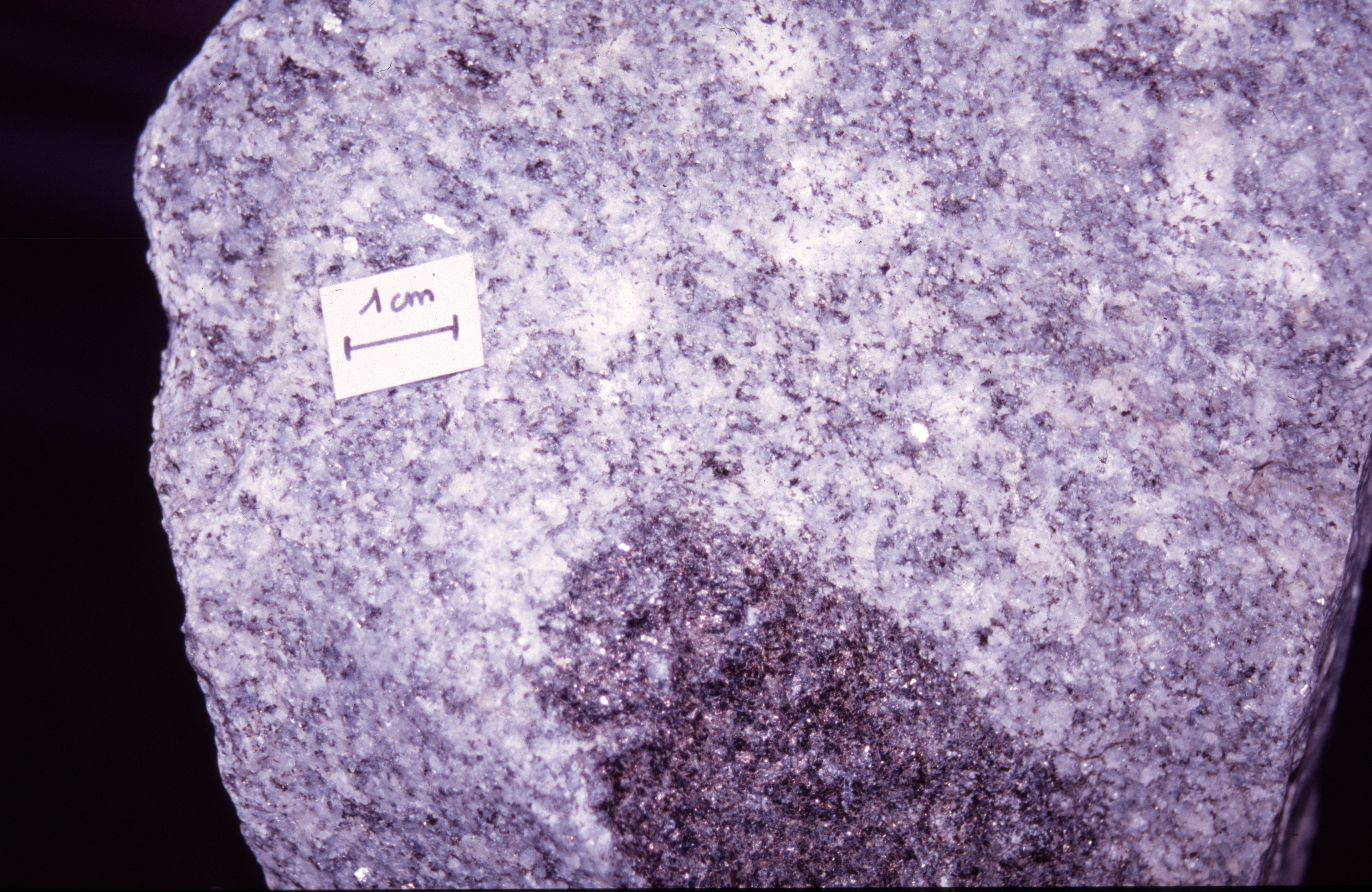 Echantillon macroscopique de leucogranite (blanc) et de restite (noir) suite à une fusion partielle continentale, en profondeur, un gneiss, roche métamorphique fond partiellement, les minéraux blancs qui le composent fondent (Quartz, feldspaths alcalins et plagioclases) pour donner naissance à un magma local très riche en silice qui recristallise en leucrogranite. Les minéraux noirs comme le mica noir biotite restent solides et s'accumulent les uns avec les autres pour former les "boules" noires de restite.